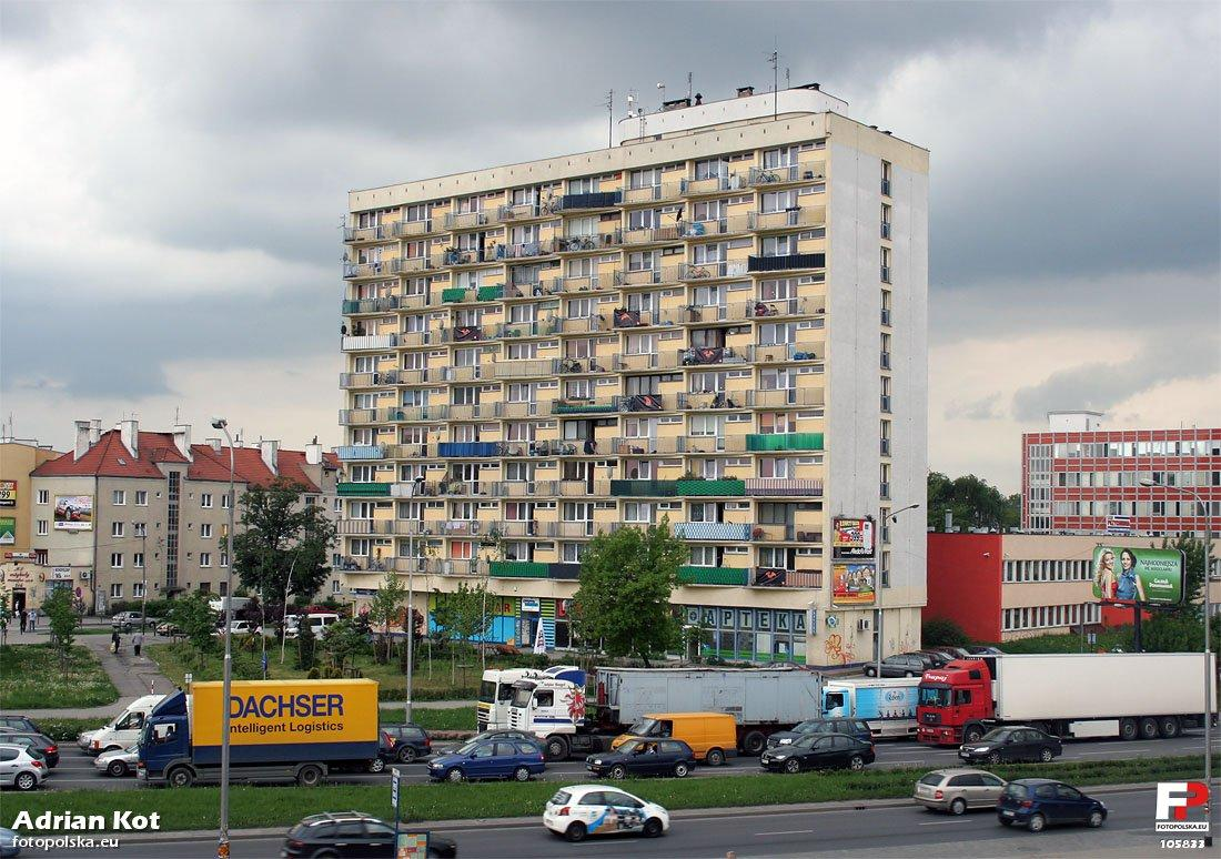 Ostrowskiego 1, widok z biurowca FAT-u.